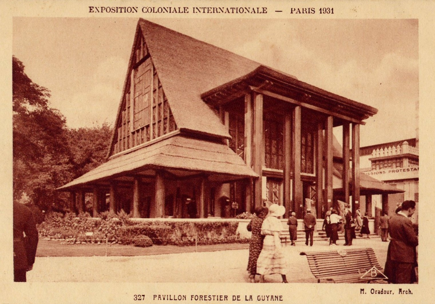 Pavillon de la Guyane à l'Exposition Coloniale de Paris en 1931